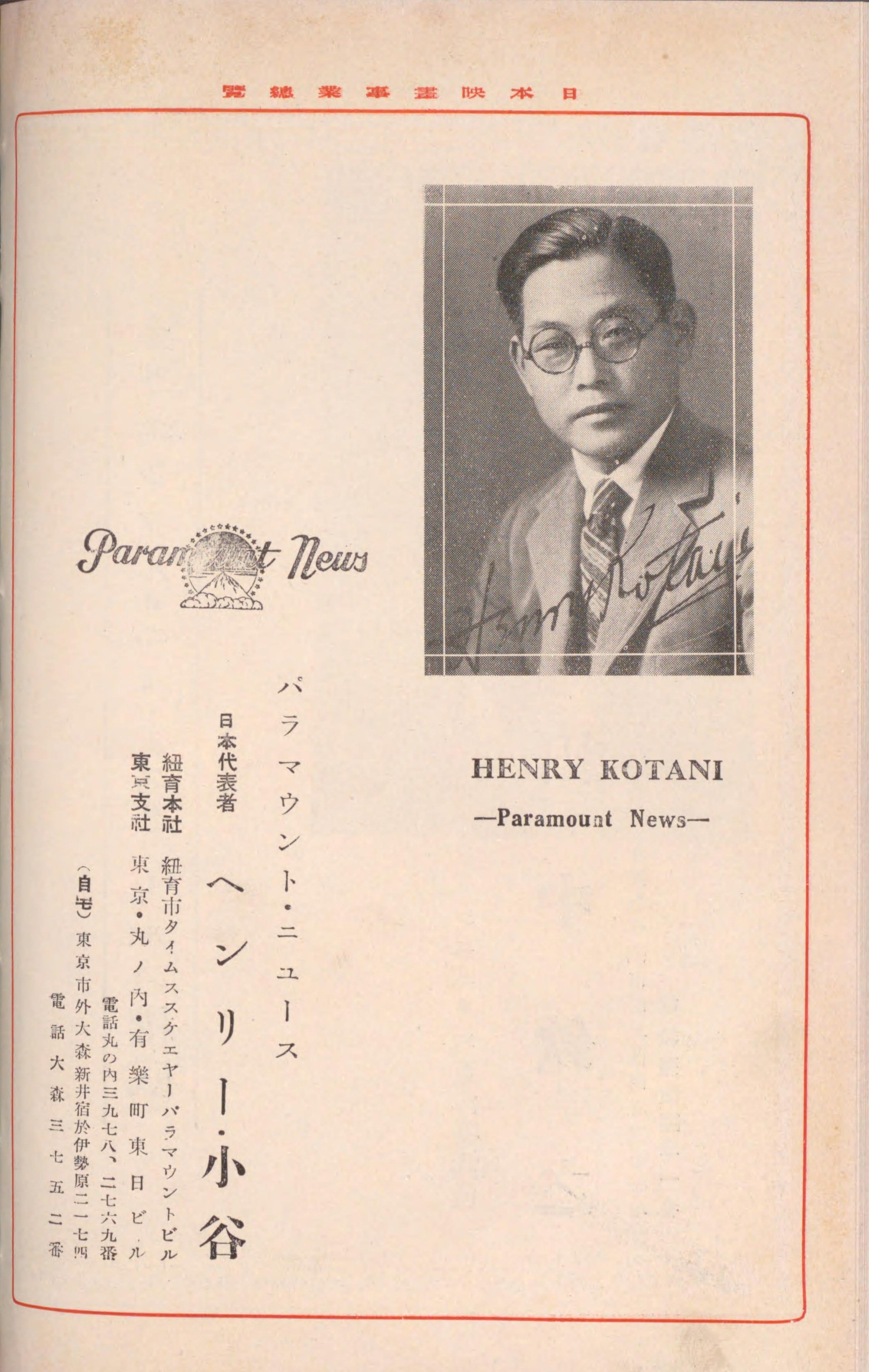 『日本映画事業総覧 昭和五年版』（p.272, 1930年）、ヘンリー小谷の広告